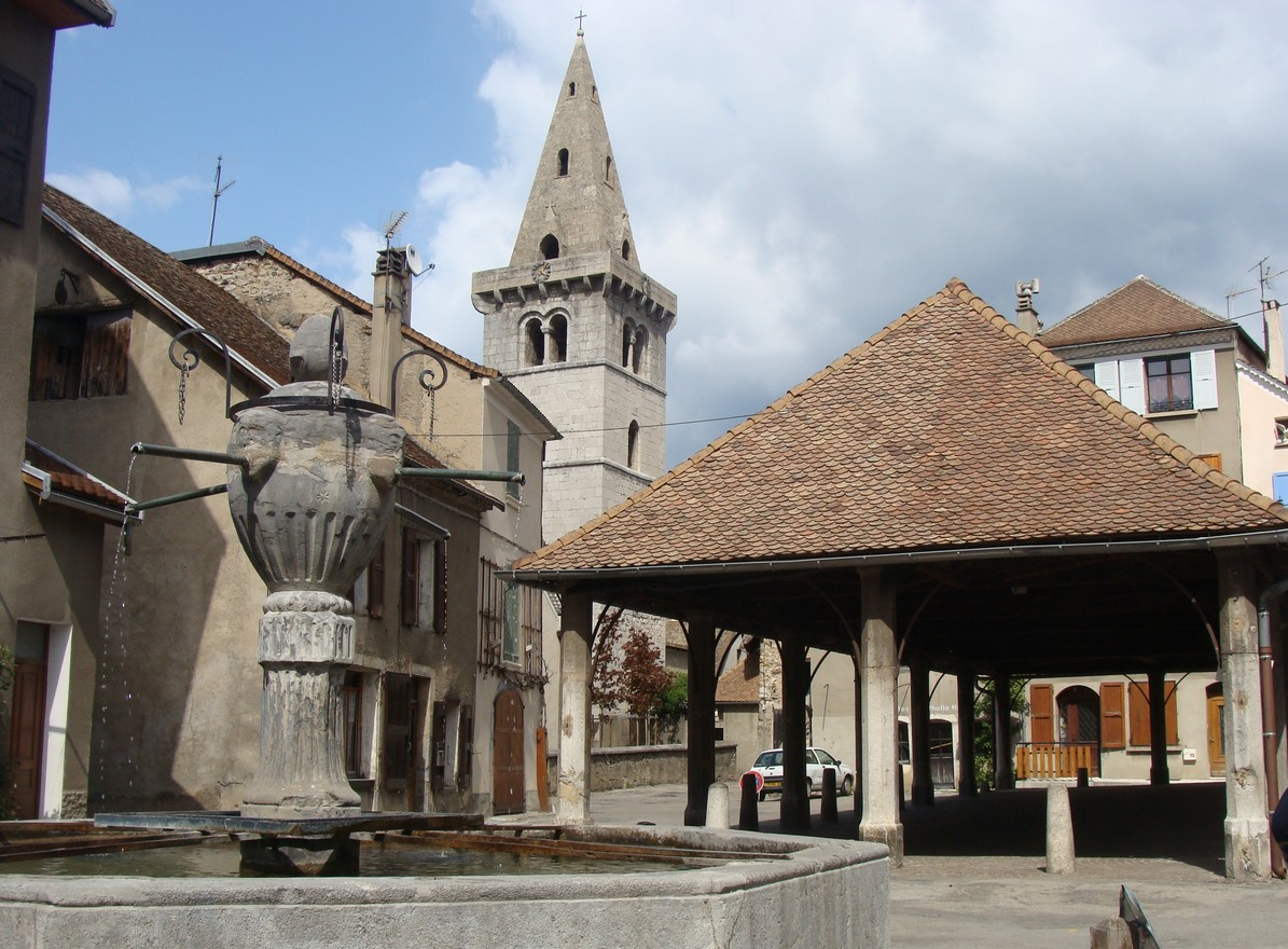 La place du marché de Mens (Isère) : la fontaine, la halle, l'église.